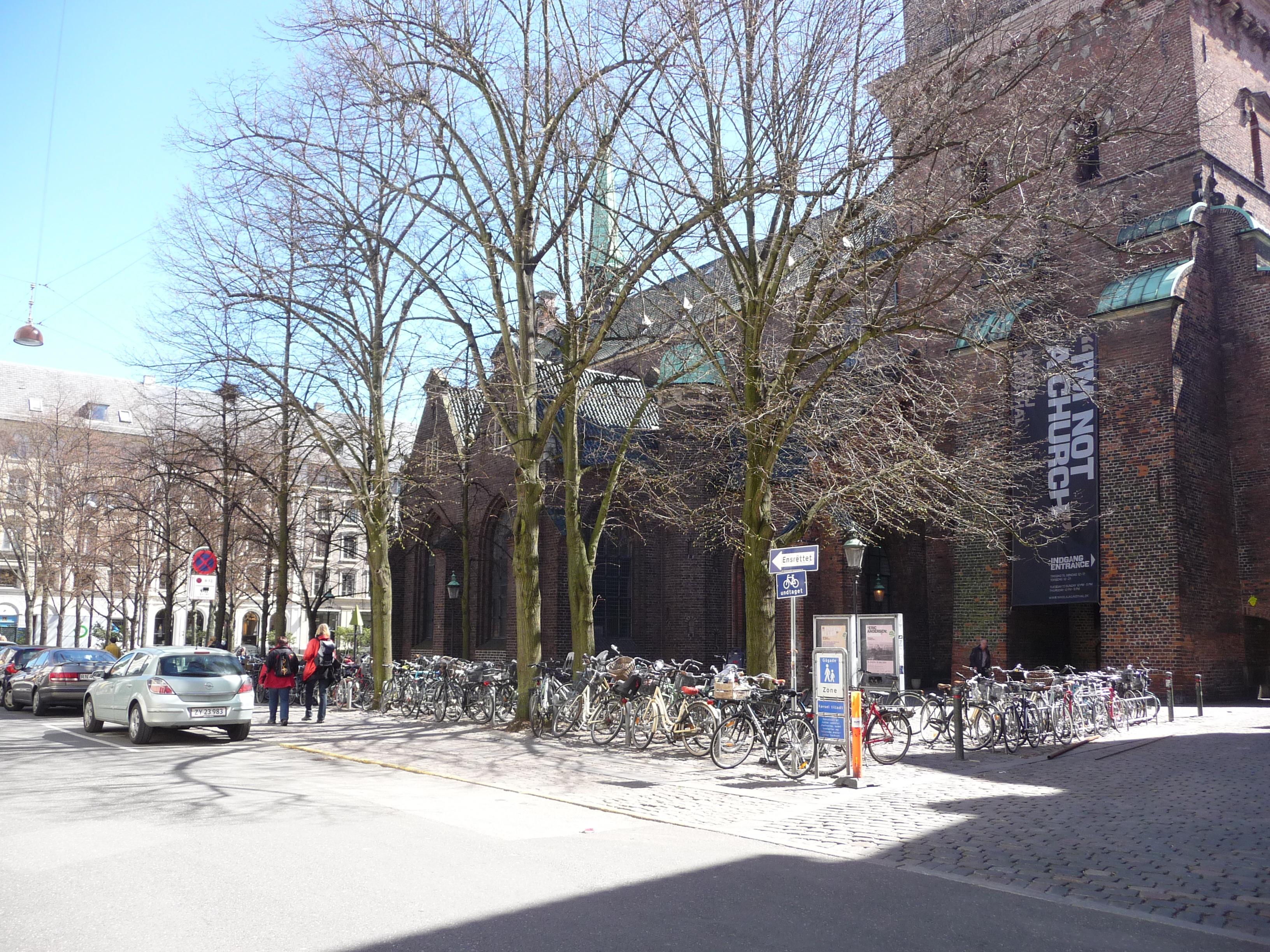 Nikolaj Plads in Copenhagen, Denmark